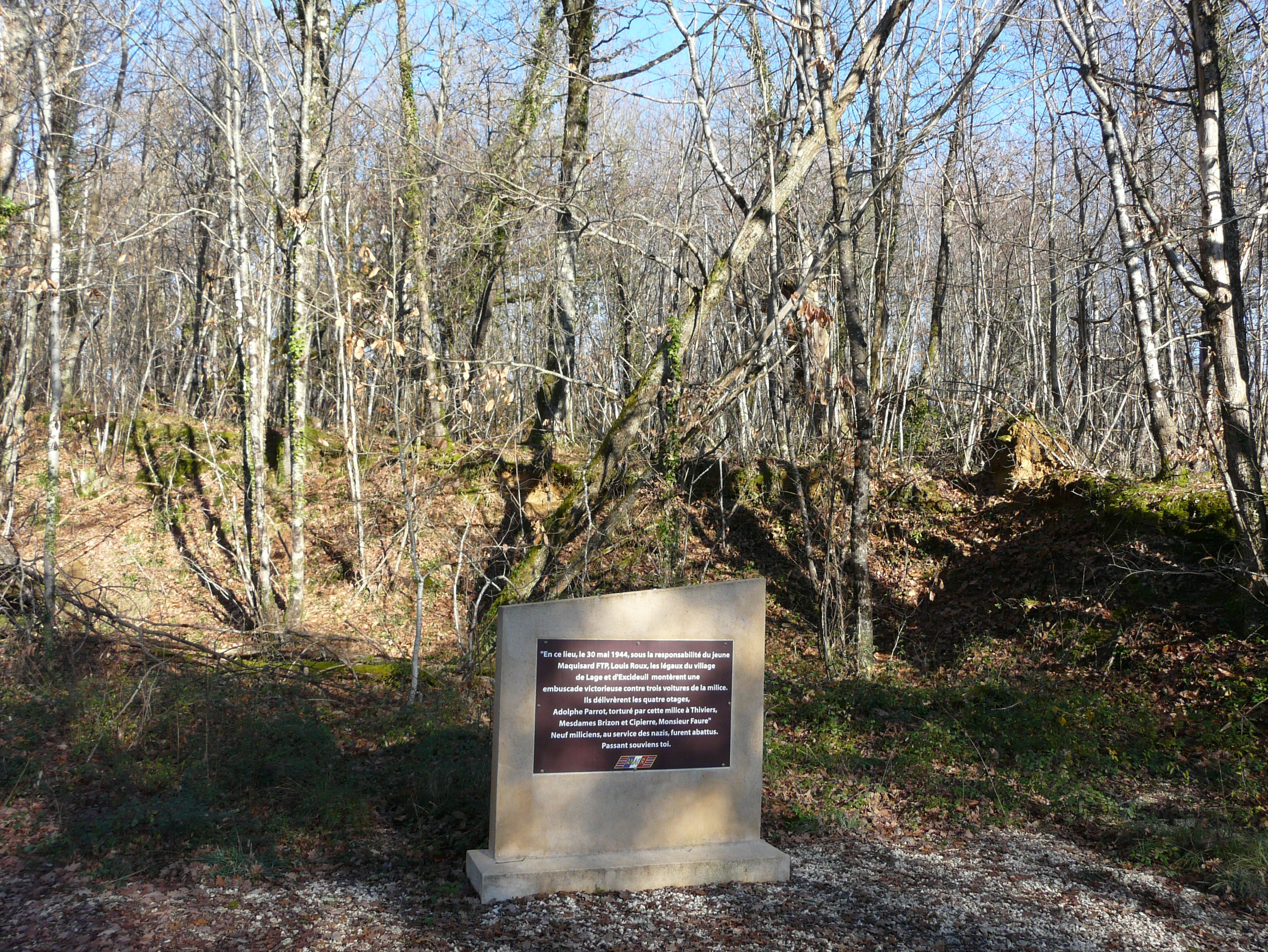 Stèle en bordure de la route départementale 76, à Saint-Germain-des-Prés, Dordogne, France.